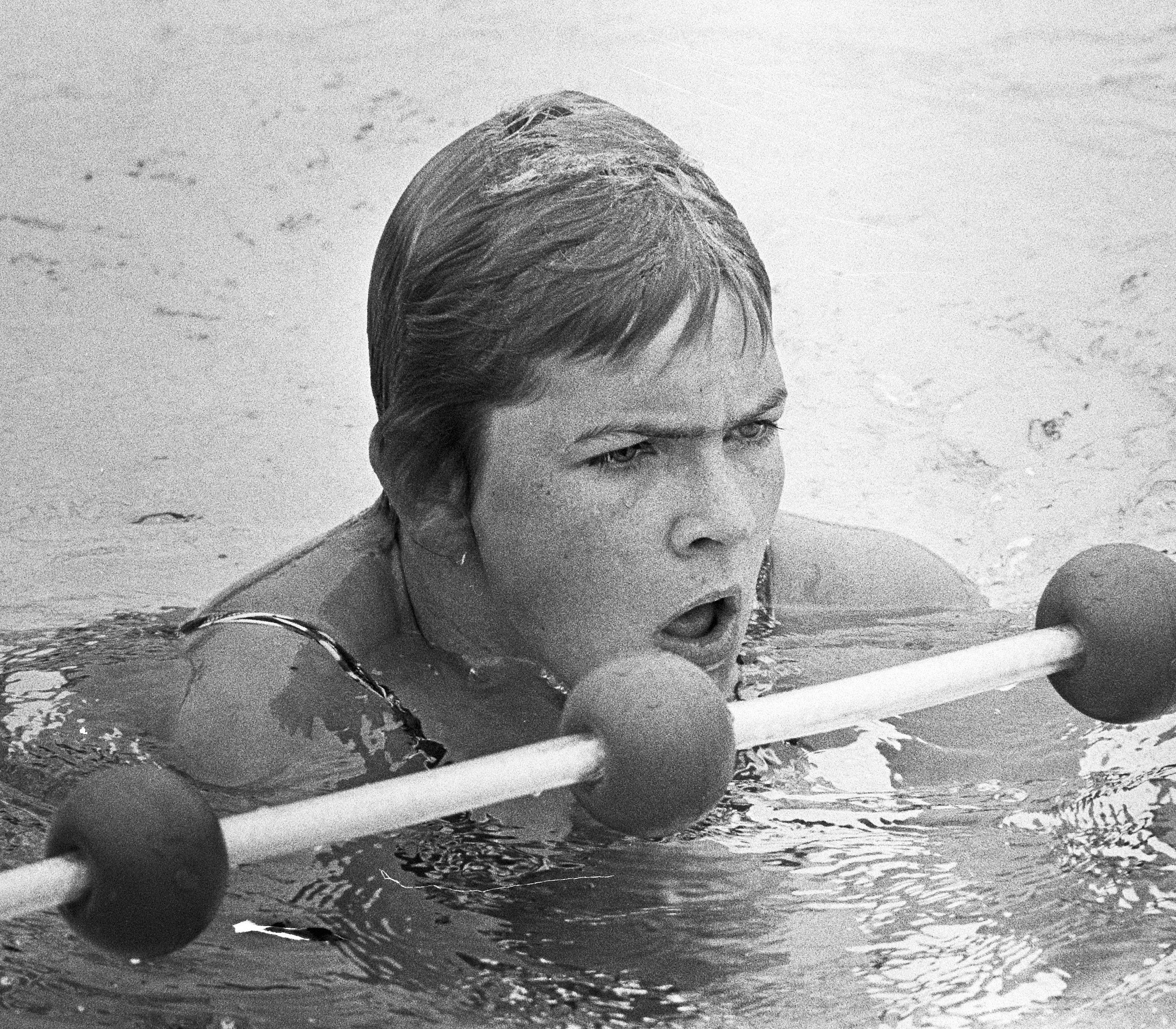 Nationale kampioenschappen zwemmen te Den Haag , Marianne Vermaat